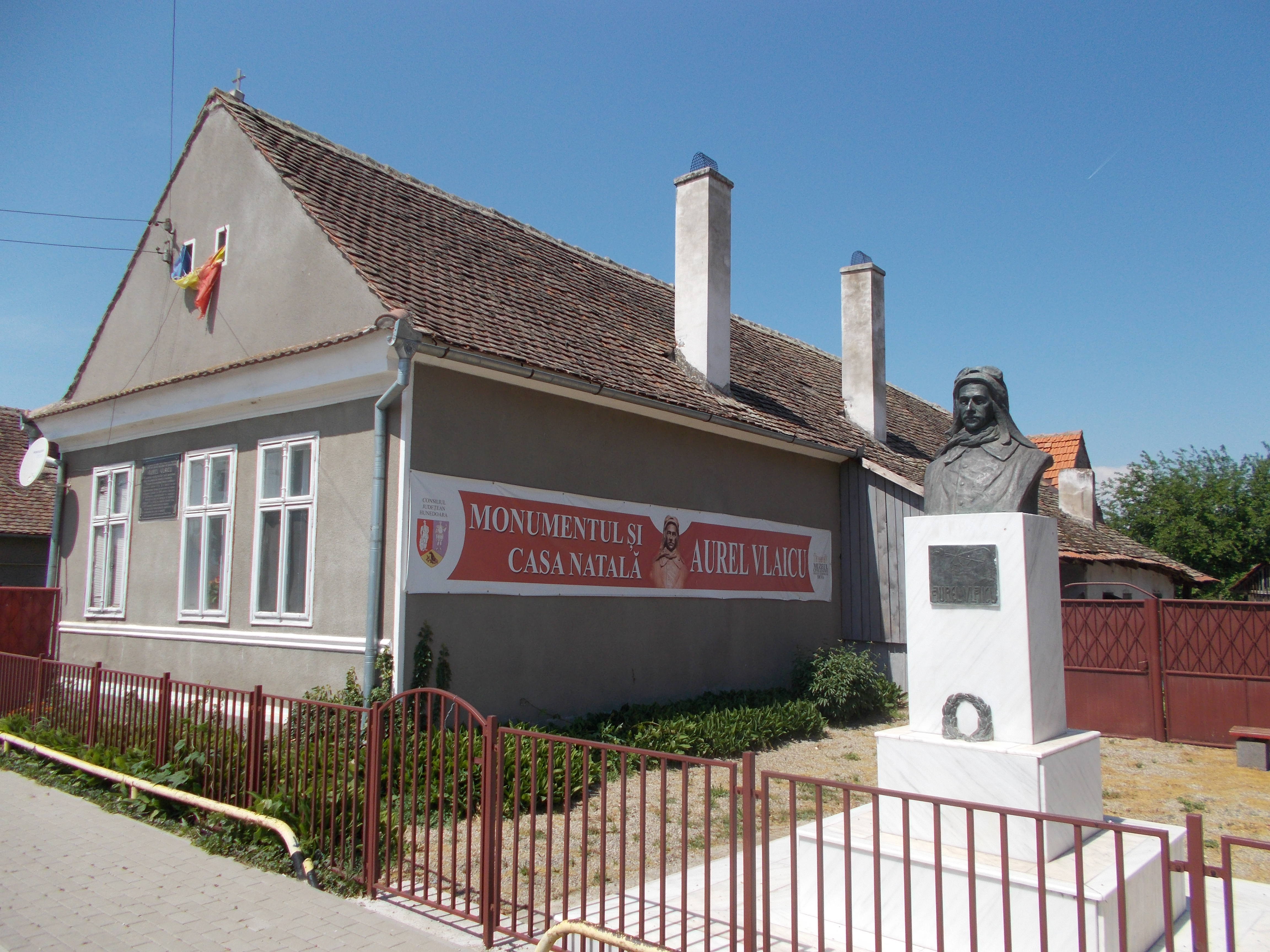 Monumentul și casa memorială Aurel Vlaicu din Binținți, județul Hunedoara